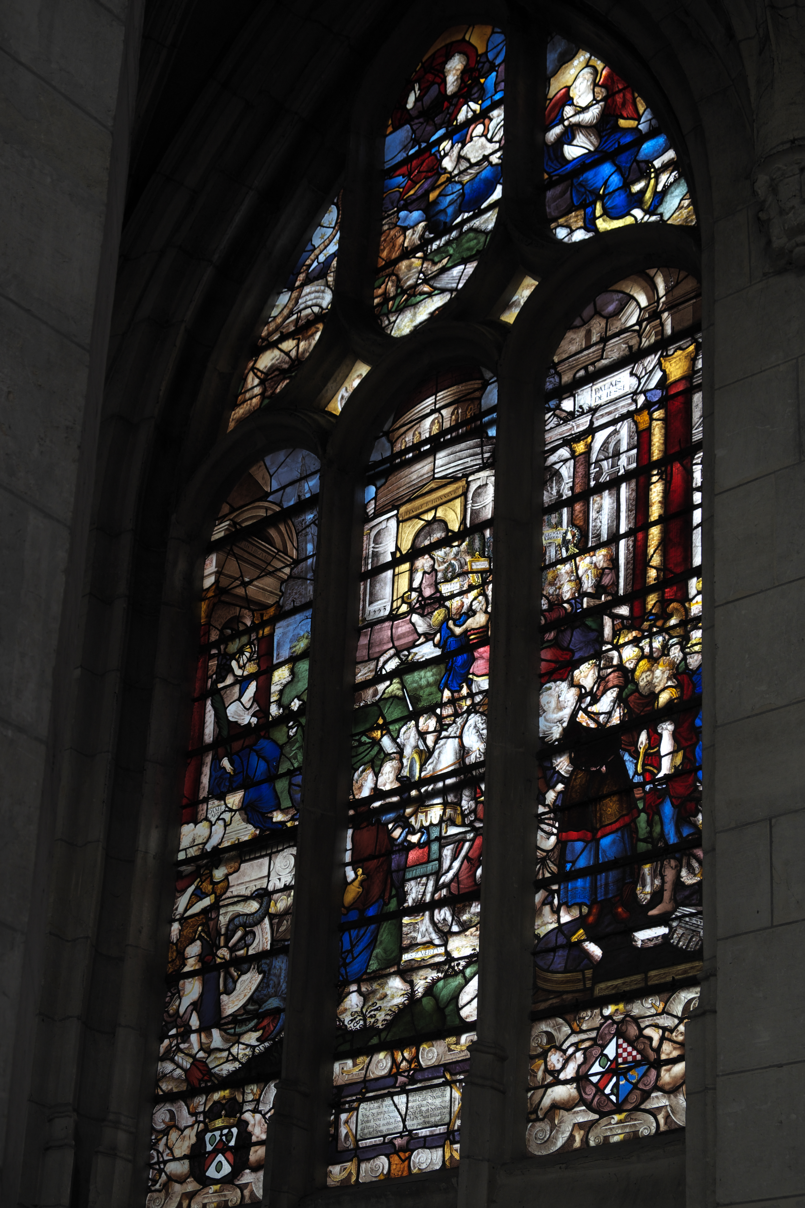 Katholische Kirche Sainte-Foy in Conches-en-Ouche im Département Eure (Haute-Normandie/Frankreich), Bleiglasfenster aus dem 16. Jahrhundert, Darstellung: 7 Tugenden